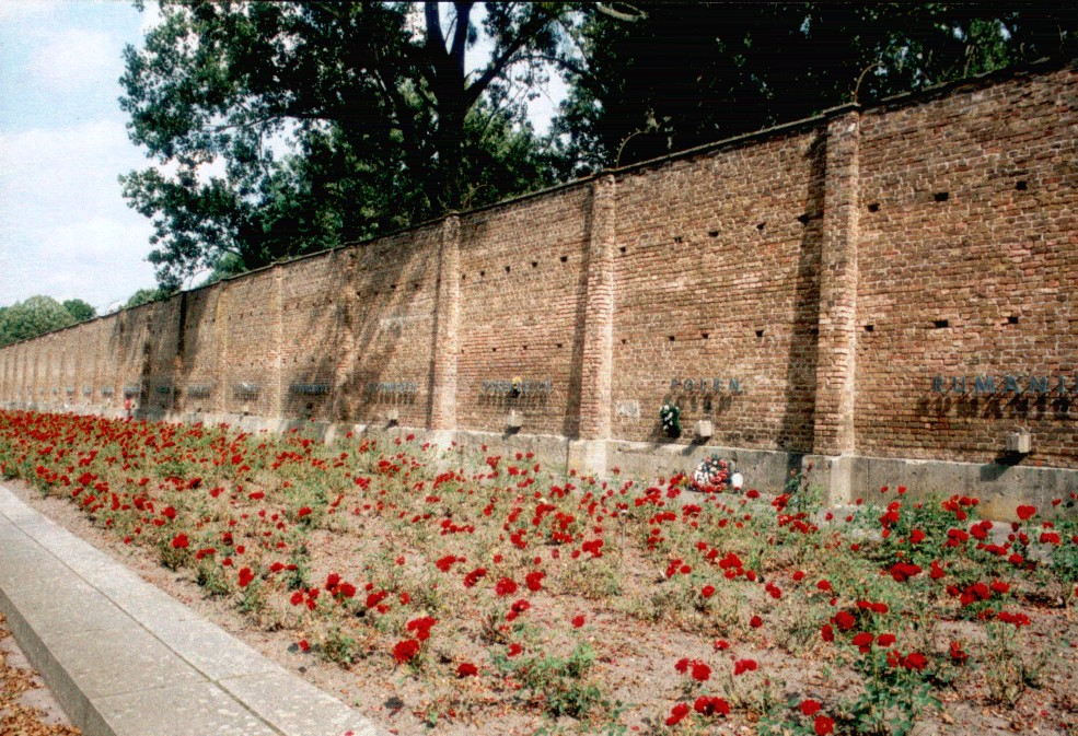 Mahn- und Gedenkstätte KZ Ravensbrück - Mauer der Nationen mit Massengrab für 300 Häftlinge